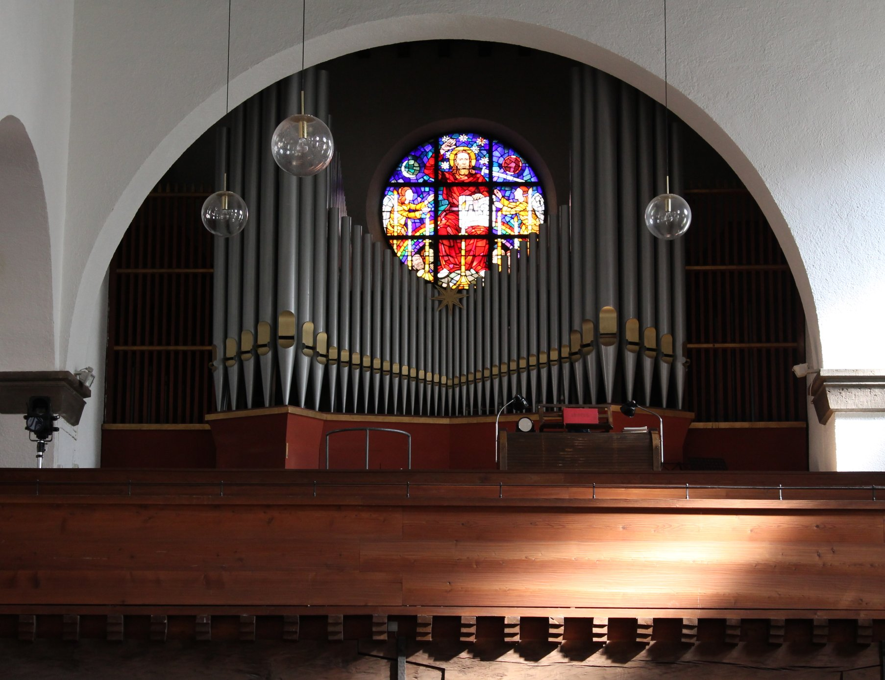 Orgel der Auferstehungskirche in München (1931, Walcker op. 2311, III/45)